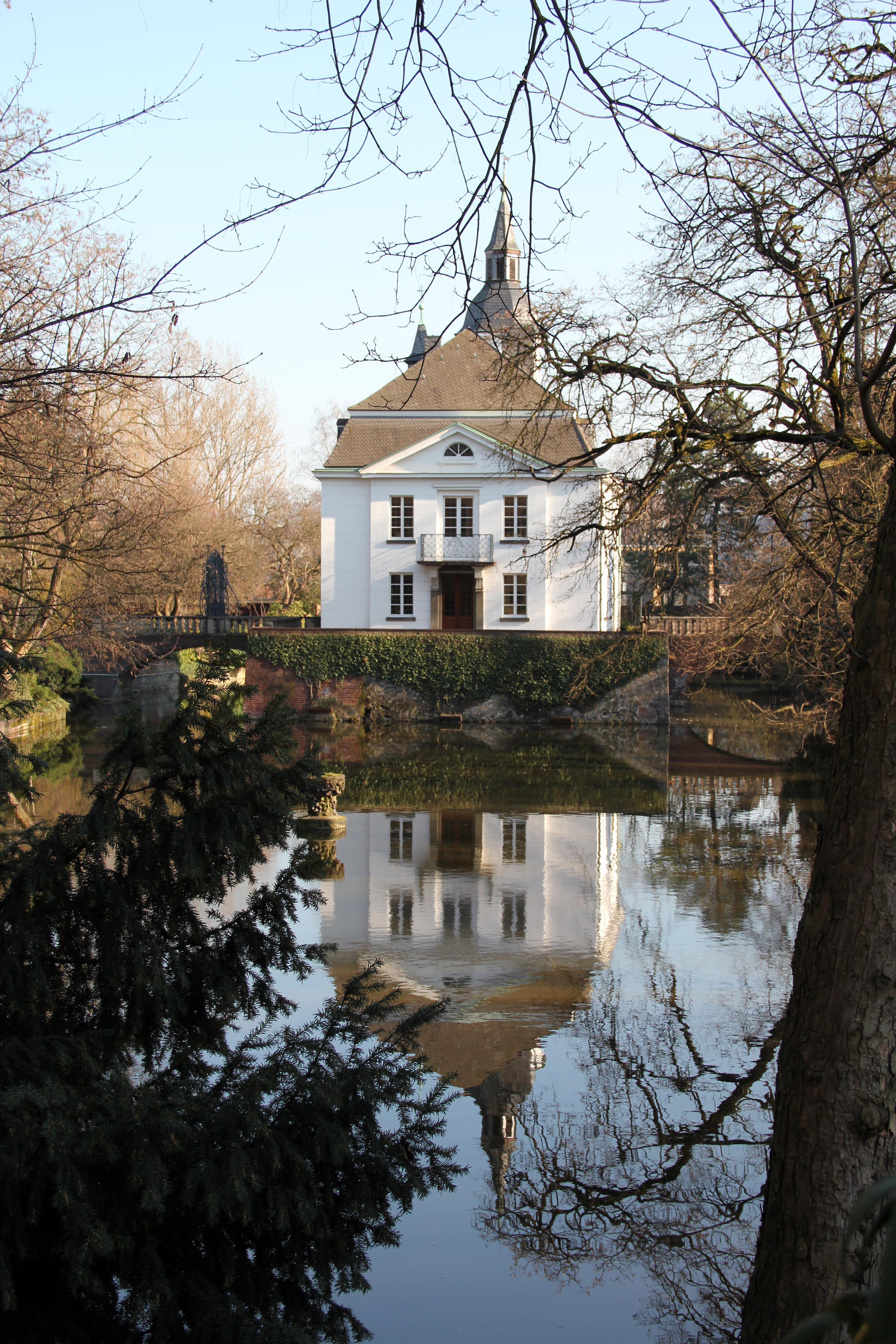 Wasserschloss Weißhaus, Luxemburger Straße Köln-Klettenberg/Sülz